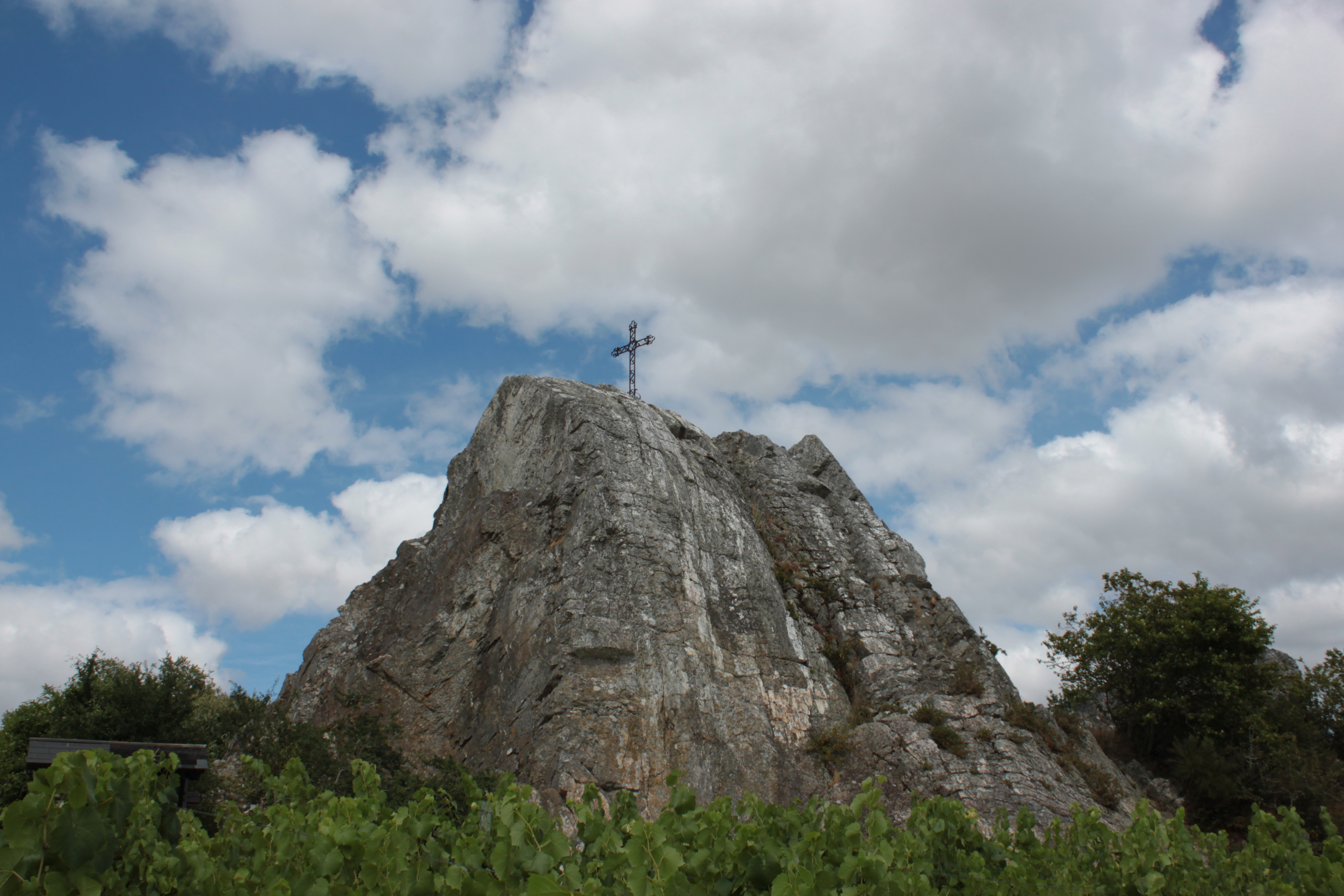 Site des Pierres-Meslières, ère préhistorique, Saint-Géreon.